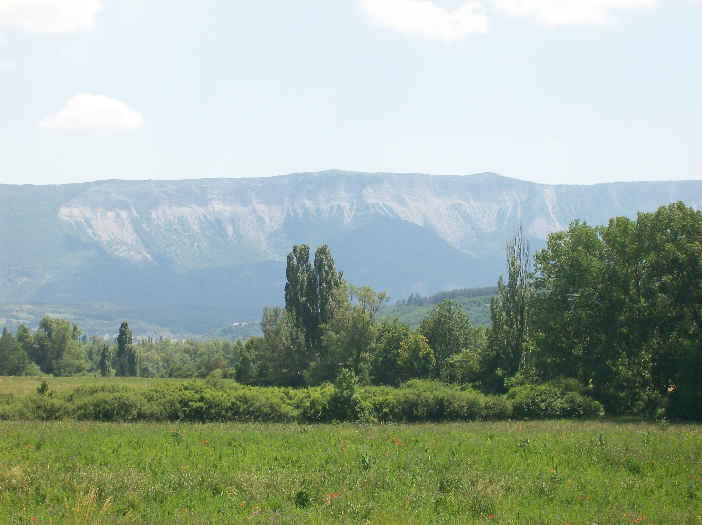 Il s'agit d'une photo générale de la montagne de Chabre, prise depuis l'ex route nationale 75 aux environs de Montrond